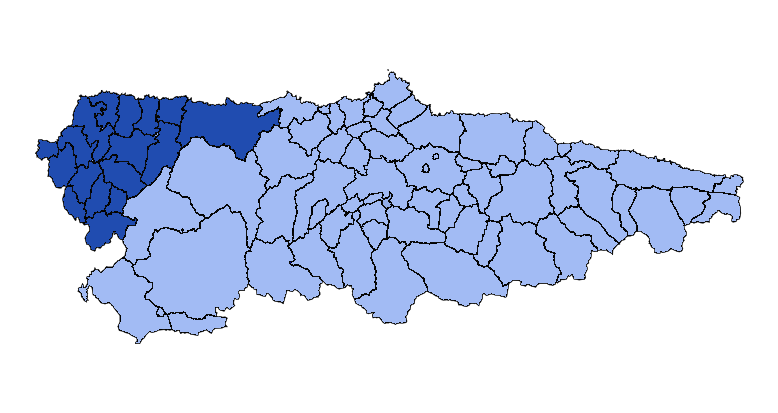 Concejos que forman la mancomunidad asturiana Occidental